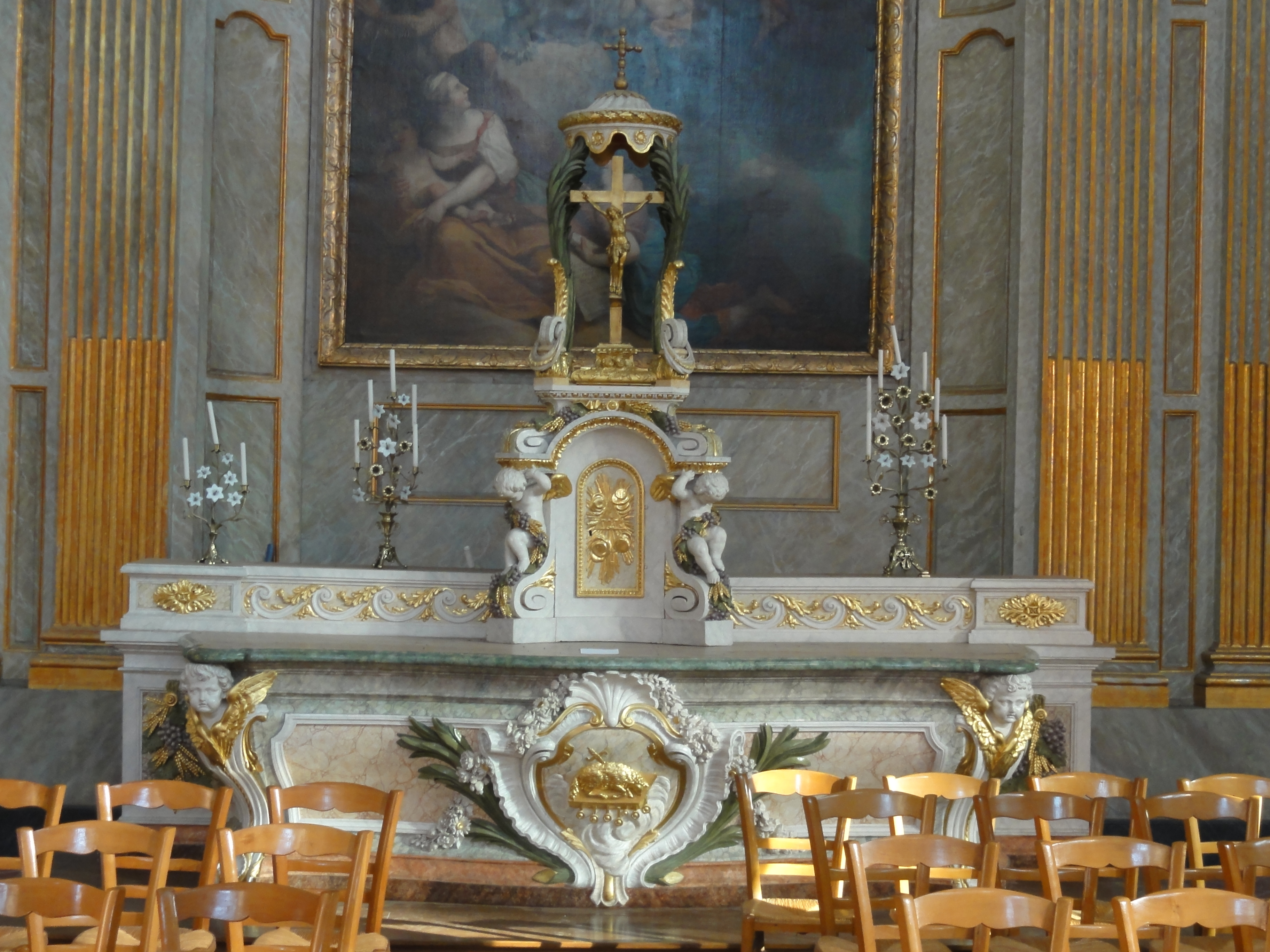 Ancien maître-autel, aujourd'hui dans le croisillon nord.